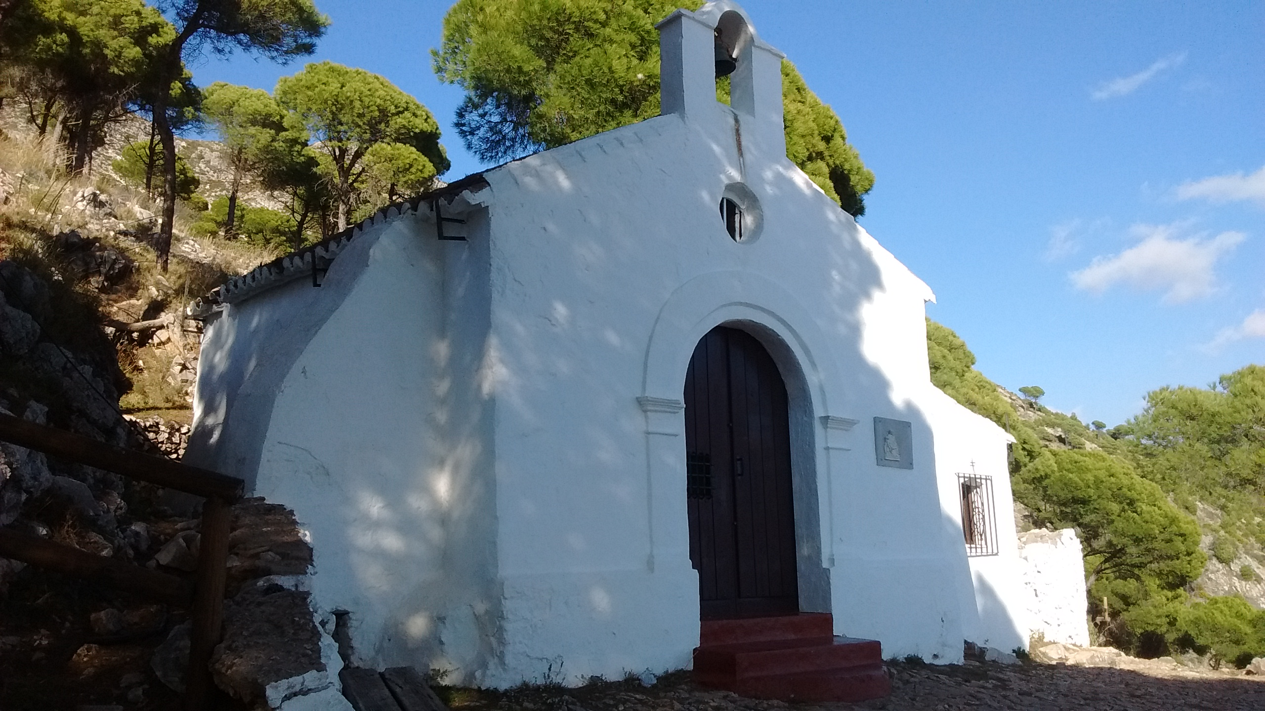 Ermita del Calvario (Mijas pueblo)